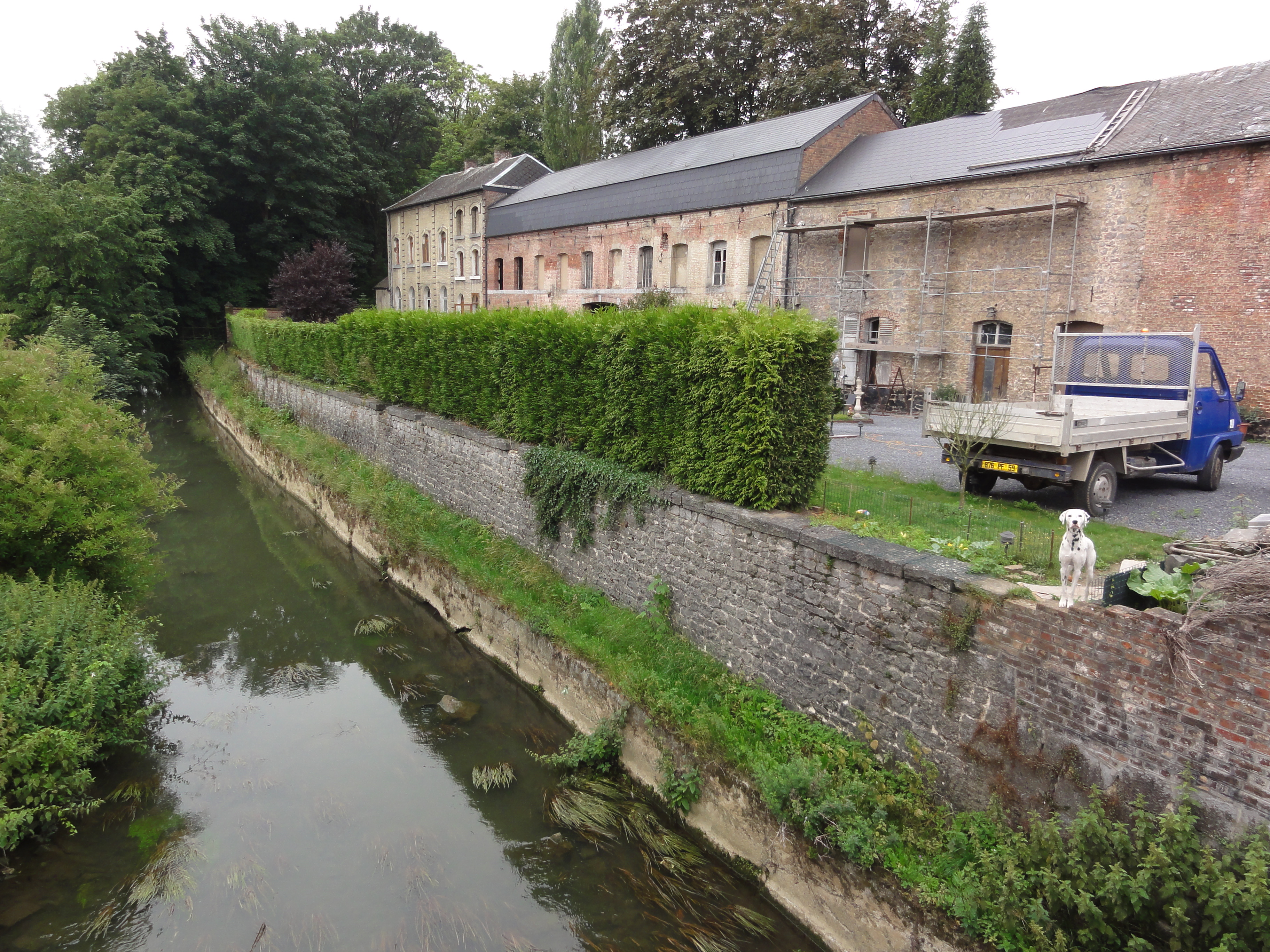 Ferrière-la-Grande (Nord, Fr) rivière la Solre